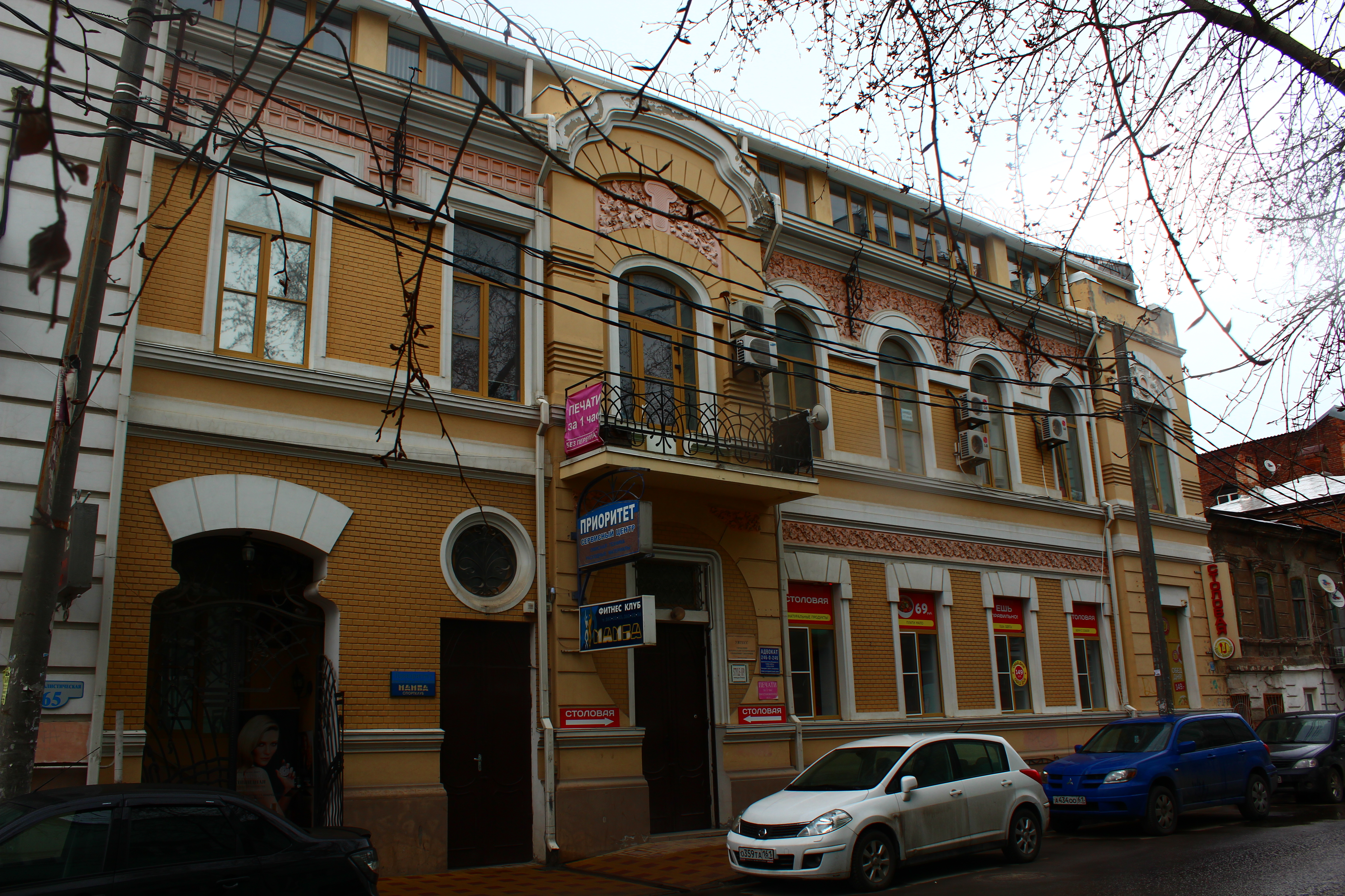 Жилой дом